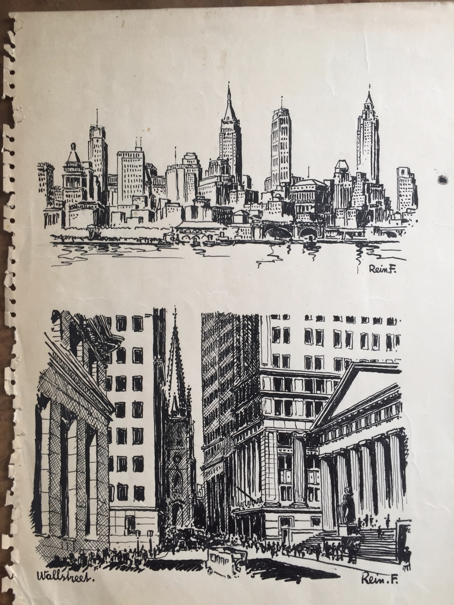 Skyline New York en Wall Street, gemaakt gedurende studiereis naar Amerika in voorbereiding van het nieuwe stadsplan van Rotterdam. De tekening is gebruikt als illustratie in een aantal artikelen die Rein Fledderus schreef voor de Haagsche Courant in 1947, over zijn studiereis in Amerika, in voorbereiding van het stadsplan voor de herbouwing van Rotterdam.